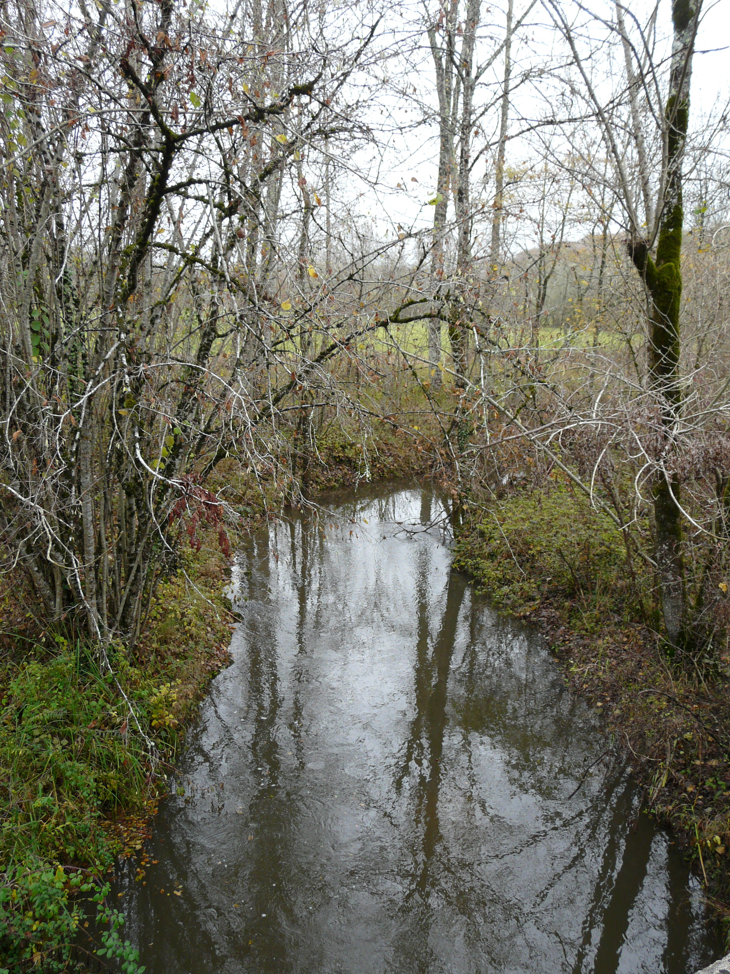 Ruisseau le Boulou vu vers l'amont, entre les Quatre Fonts et les Guichards. À gauche, Paussac-et-Saint-Vivien, à droite, Saint-Julien-de-Bourdeilles.